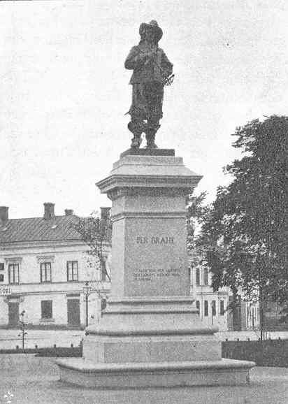 Per Brahes staty i Åbo, vid skvären invid domkyrkan. Ur verket "Finland i ord och bild" av O. M. Reuter, tryckt i Stockholm 1901, sidan 321.